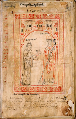 Manegold von Lautenbach, Liber ad Gebehardum. 12. Jh., aus Kloster St. Johann in Blaubeuren, Badische Landesbibliothek, Hs. Rastatt 27, Blatt 1r